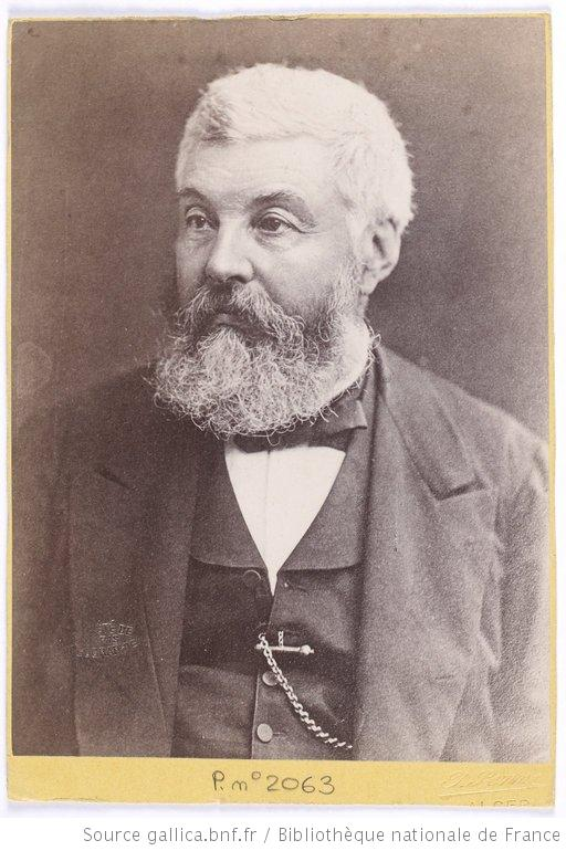 photo tirée de Gallica